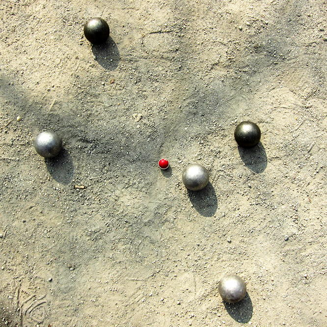 Team B (helle Kugeln) hat einen Punkt liegen, da Team A (dunkle Kugeln) bereits an zweiter Stelle liegt.